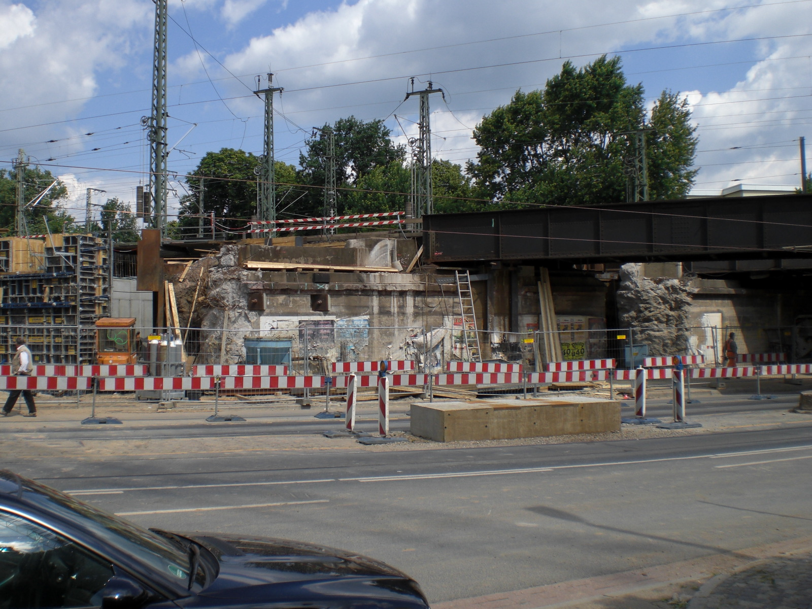 Bremen: alte Widerlager des Concordia-Tunnels werden abgerissen